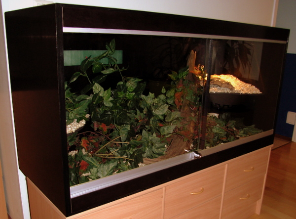 Kuva filmivaneriterraariosta, mitat P120 x L45 x K60 cm Kuva filmivaneriterraariosta, mitat P120 x L45 x K60 cm